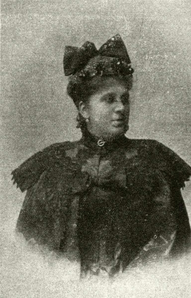 Olga Lewinsky, die zur Lektorin an der Universität Wien ernannt wurde Olga Lewinsky (Birth name: Olga Precheisen; 1853-1935), Austrian actress